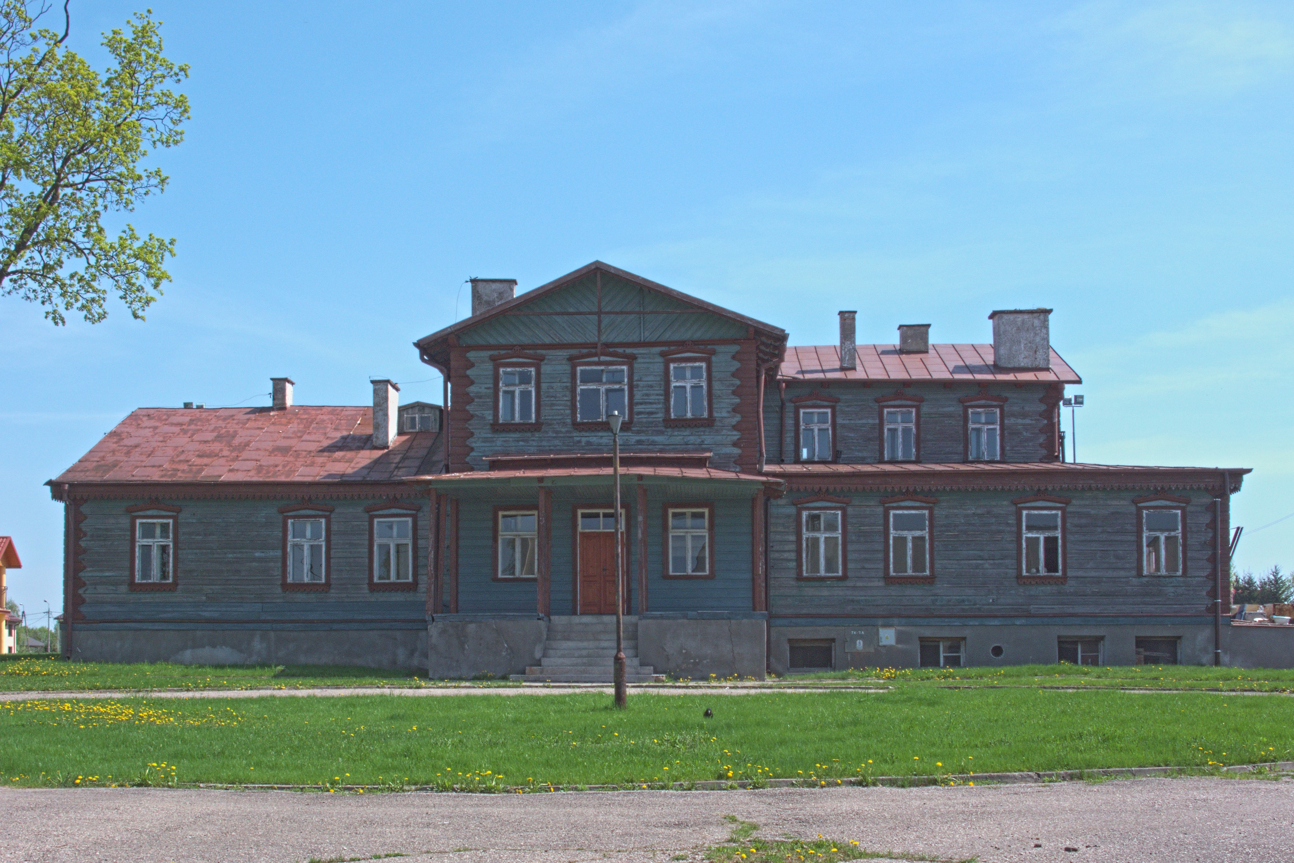 Dworek Smulskich z końca XIX w. położony przy ulicy Hołowieskiej w Bielsku Podlaskim